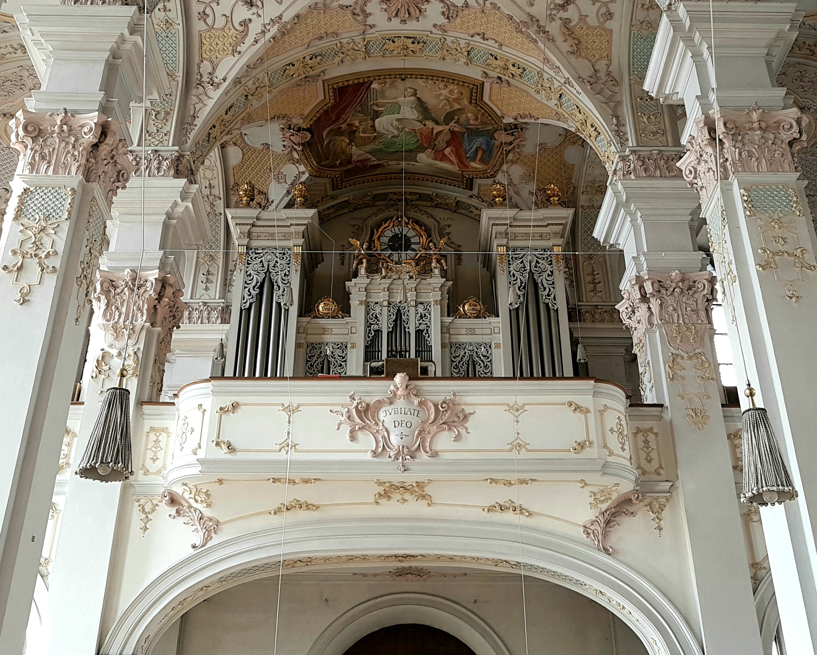 München, Hl. Geist München, Orgel(empore).